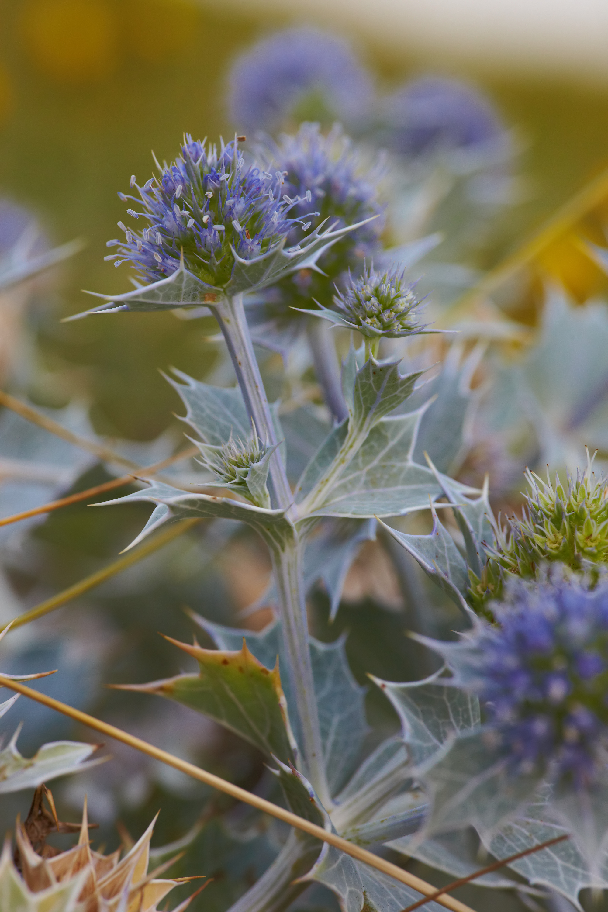 Eryngium maritimum